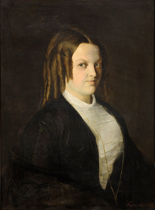 Dame mit Schillerlocken. Signiert. Öl auf Leinwand, 62×46 cm